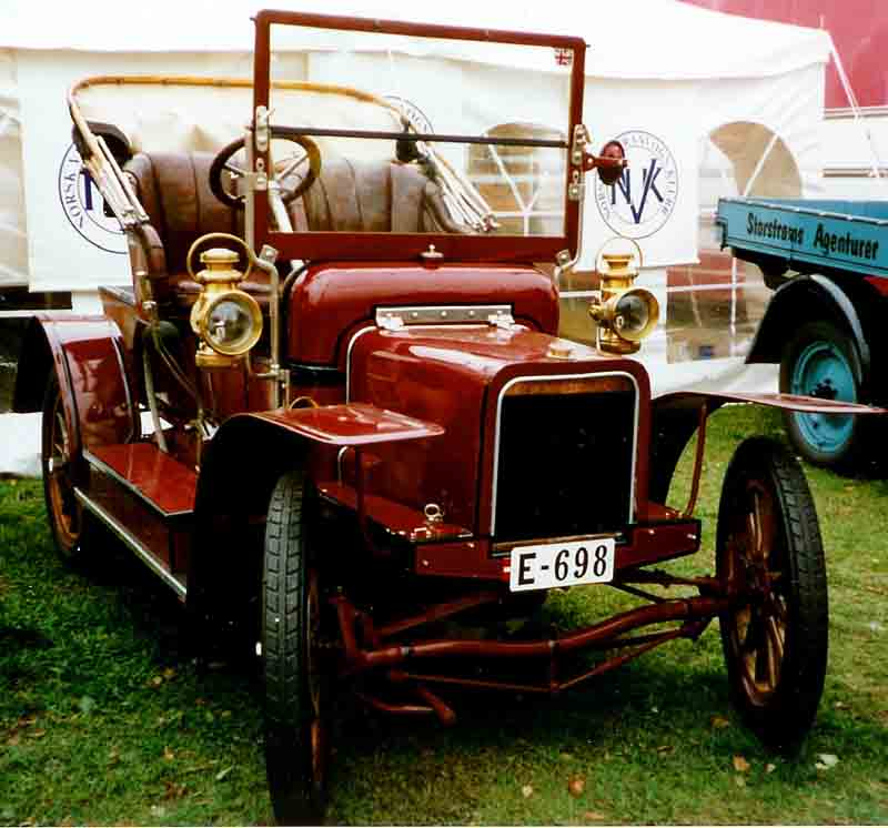 Rover 1908